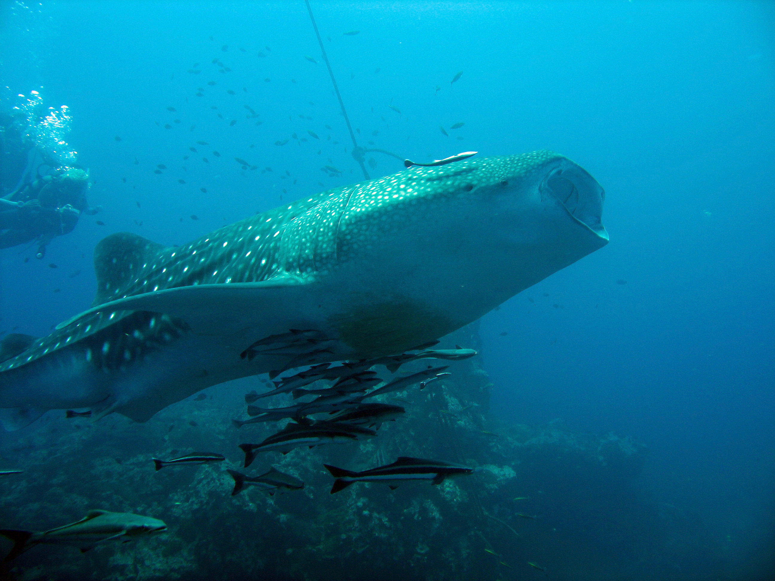 Whaleshark